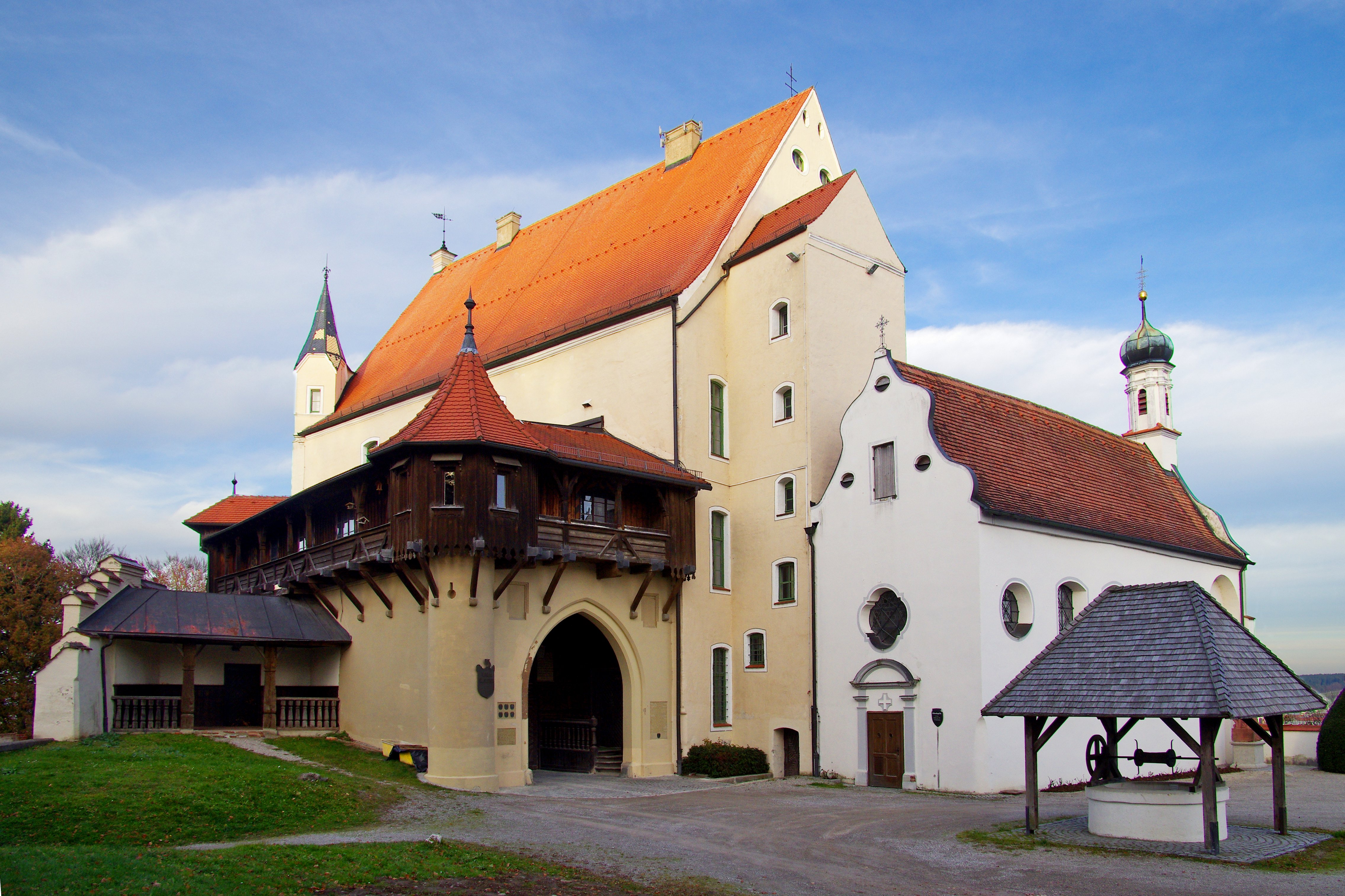 Bilder von der Mindelburg oberhalb der Stadt Mindelheim